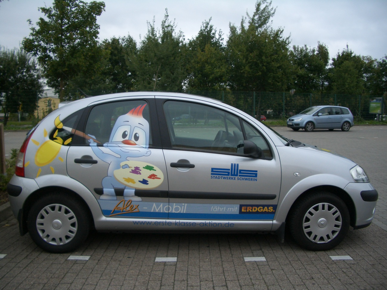 erdgasbetriebenes Auto der Stadtwerke Schwerin